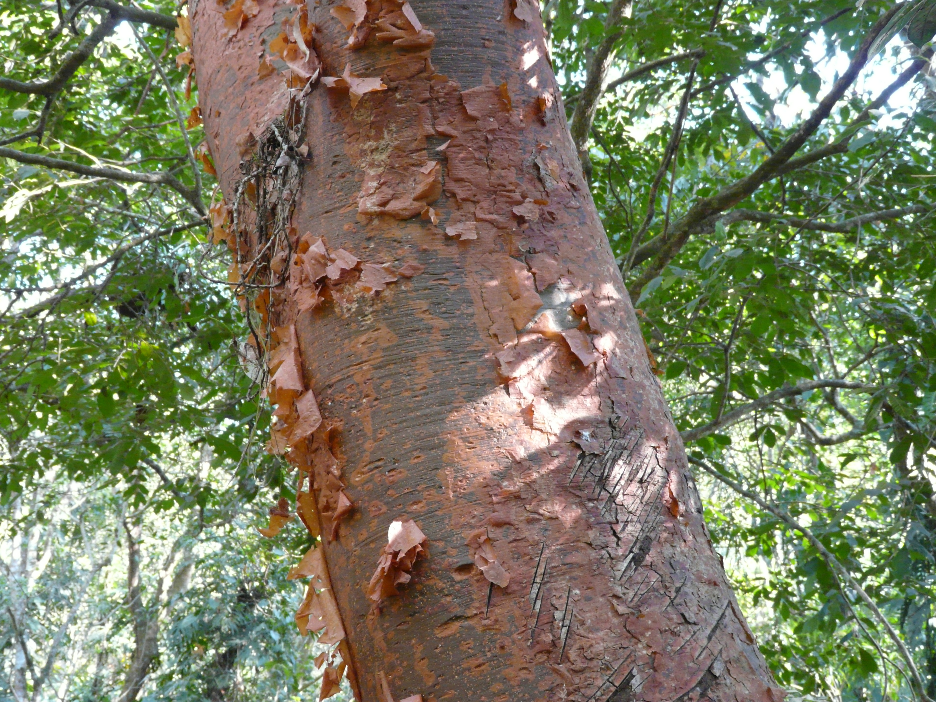 Kummibursera (Bursera simaruba) jaanuaris, Copán, Hondura.